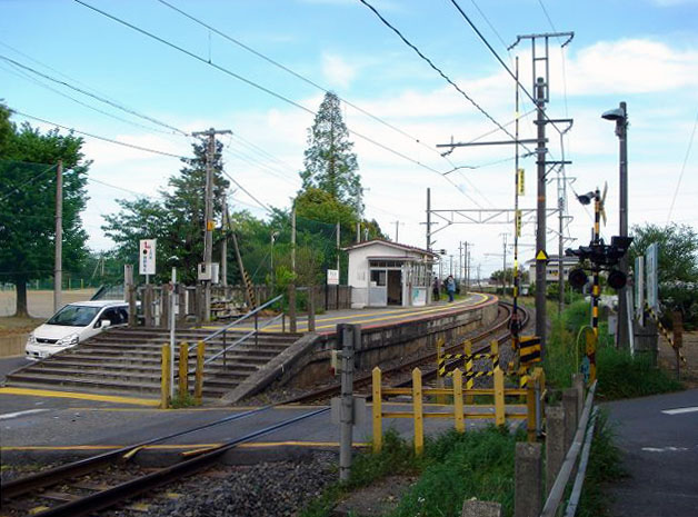 荒尾駅（JR東海・東海道本線（美濃赤坂線）・岐阜県大垣市） 撮影：投稿者、撮影日：2005年5月